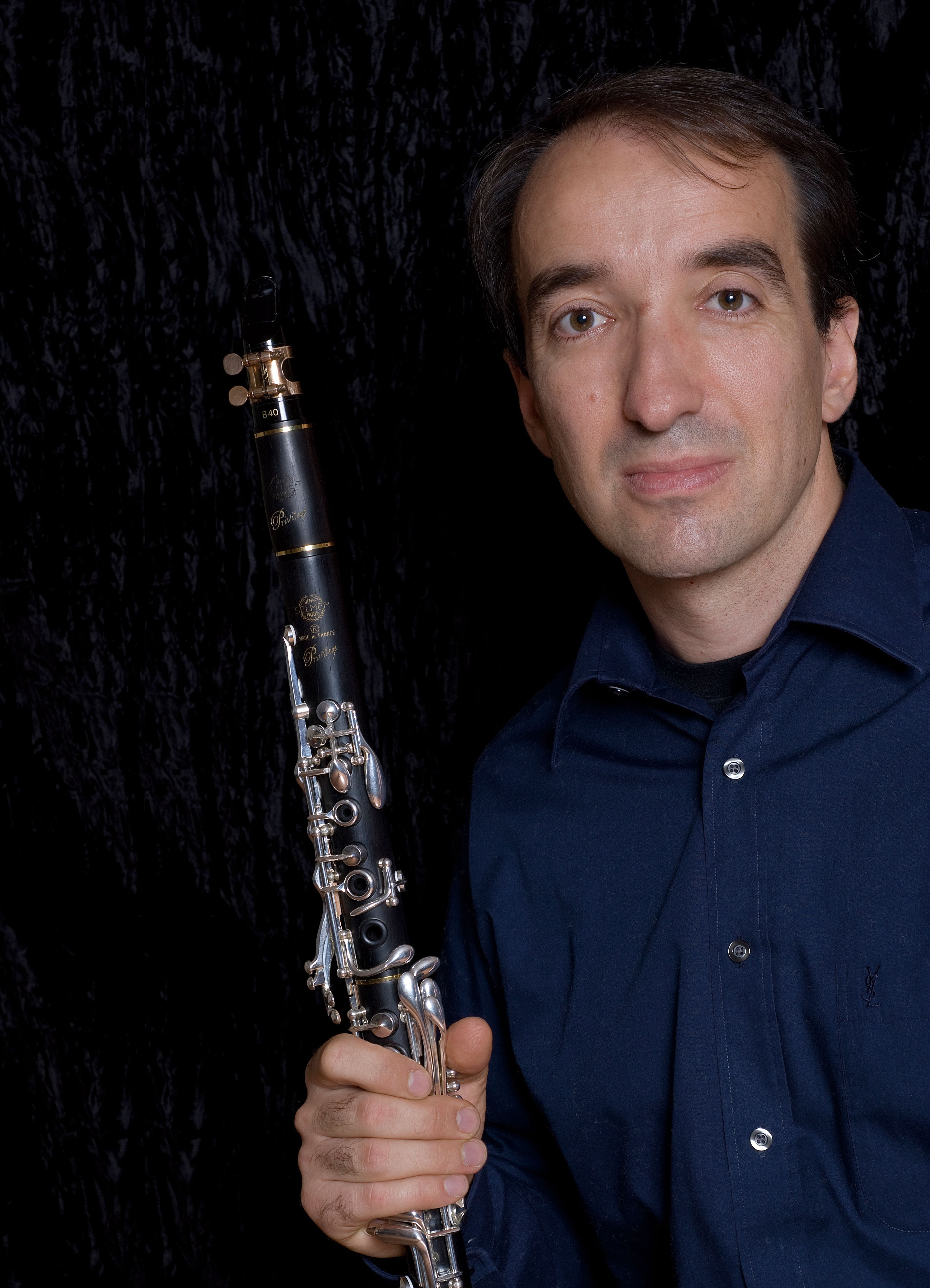 Photo Jean-Marc Fessard